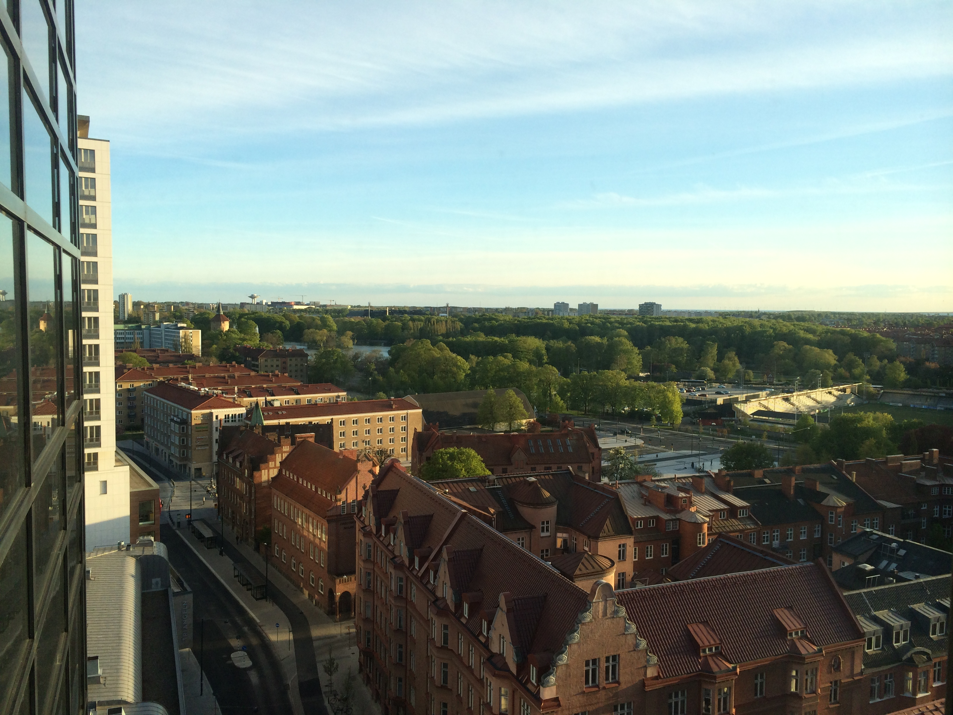 Aerial view towards Pildammsparken taken from hotell Triangeln.